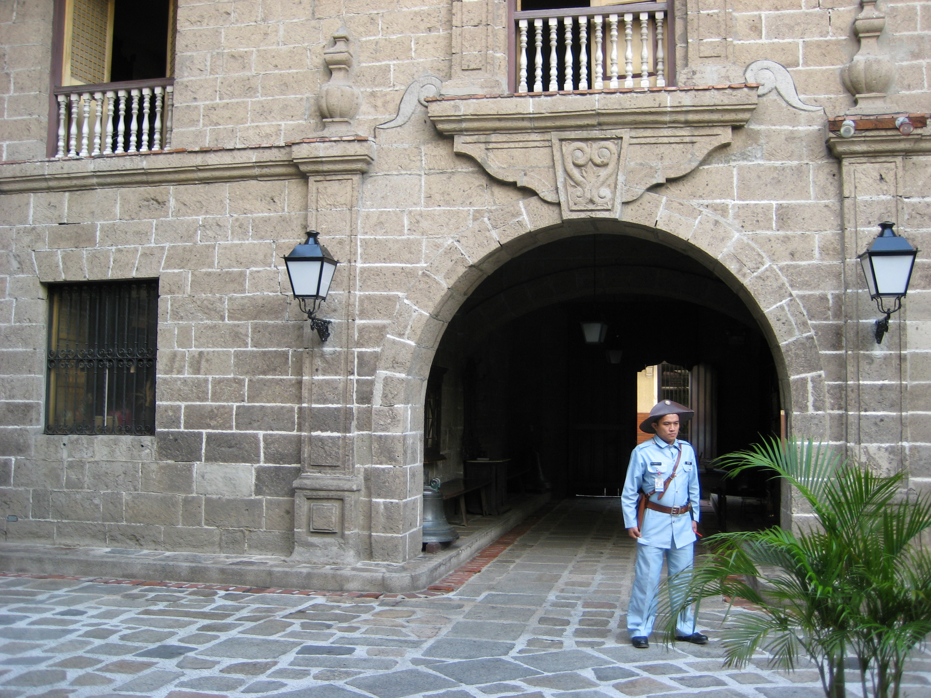 Casa colonial en Intramuros, Manila, Filipinas